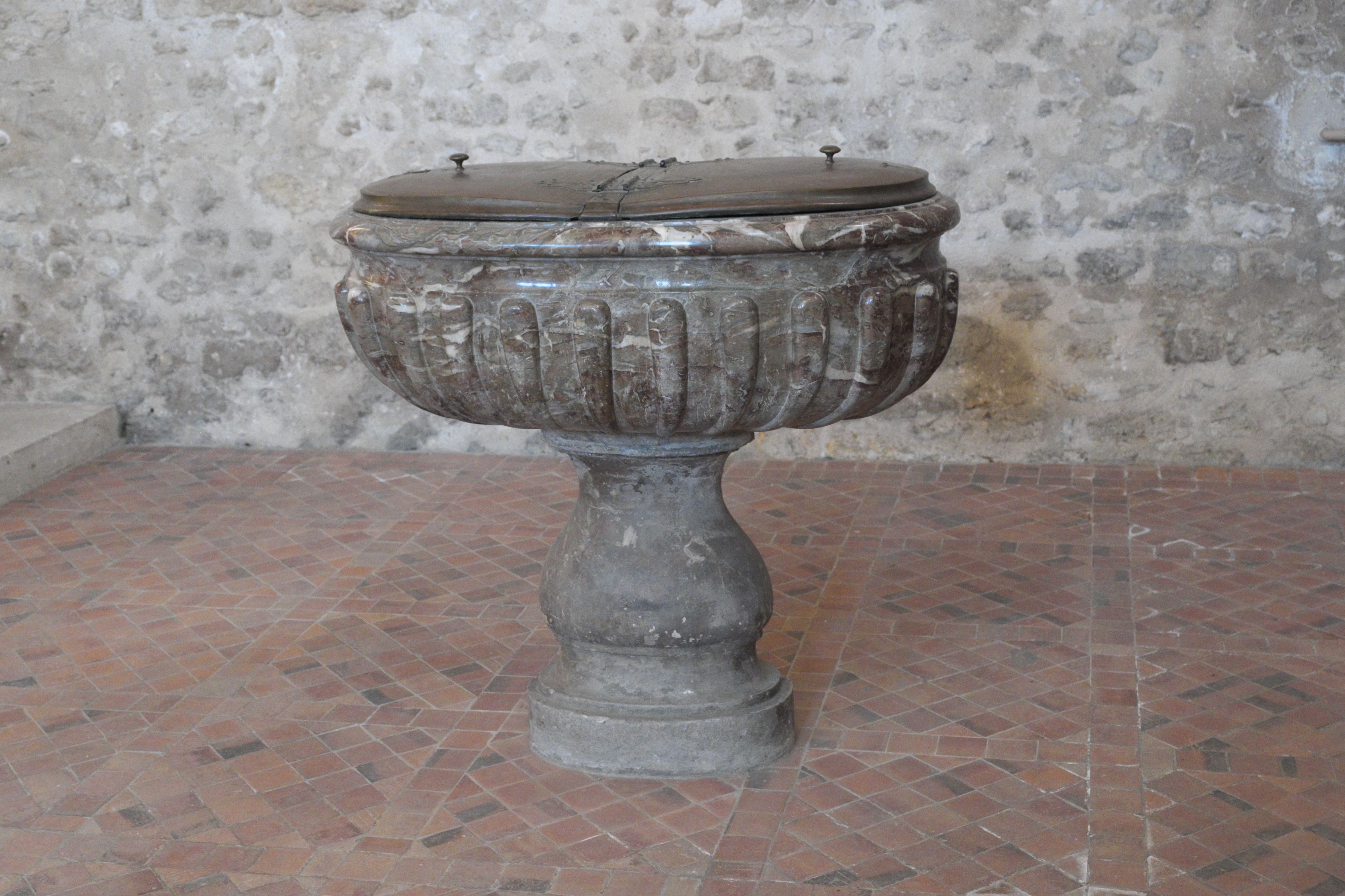 Katholische Pfarrkirche Saint-Nicolas in Saint-Arnoult-en-Yvelines im Département Yvelines (Region Île-de-France/Frankreich), Taufbecken.